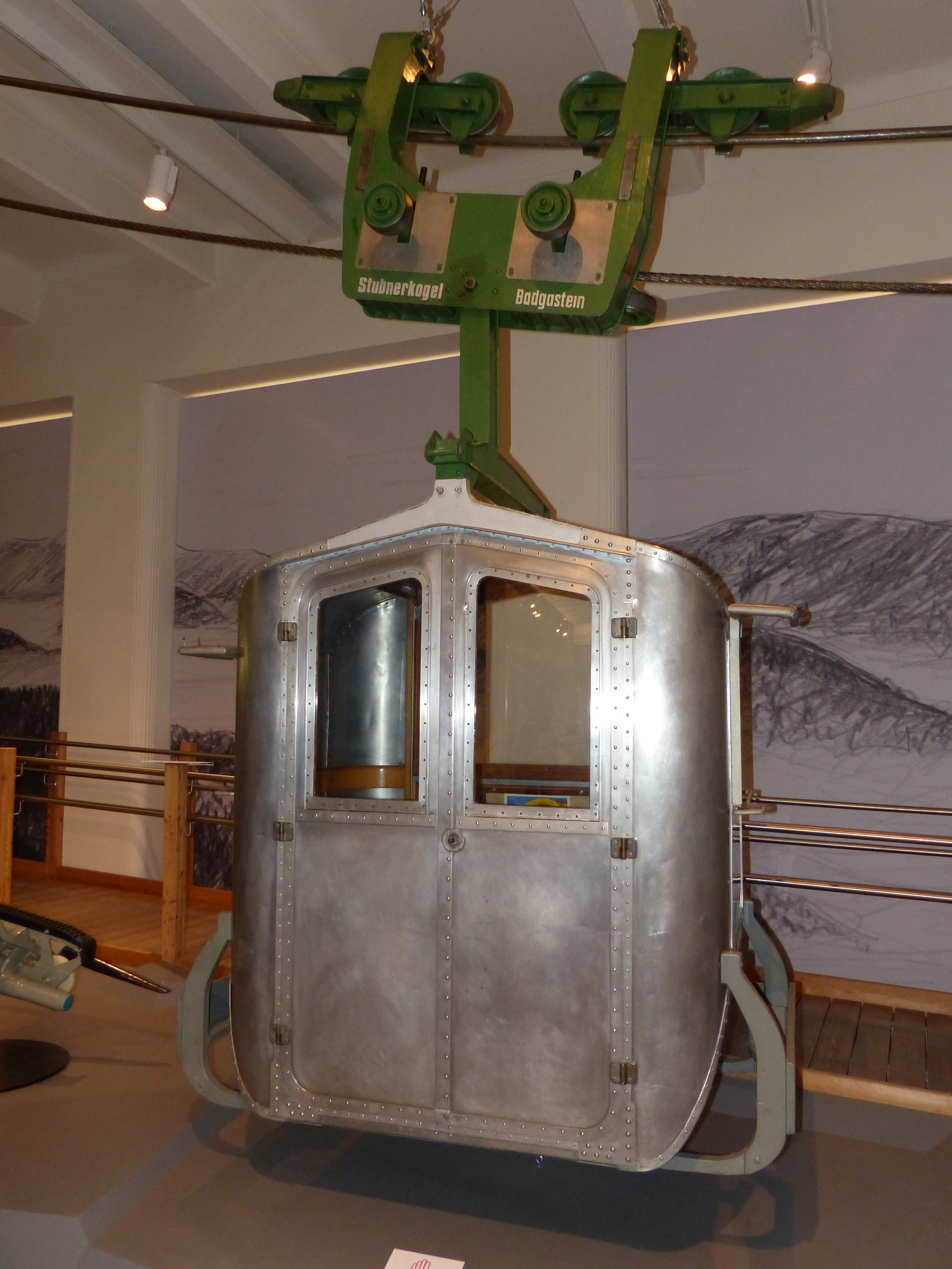 Stubnerkogelbahn-Kabine, Umlaufseilbahn, 1950; 1951 Modernste Seilbahn Europas; Exponat im Technischen Museum Wien